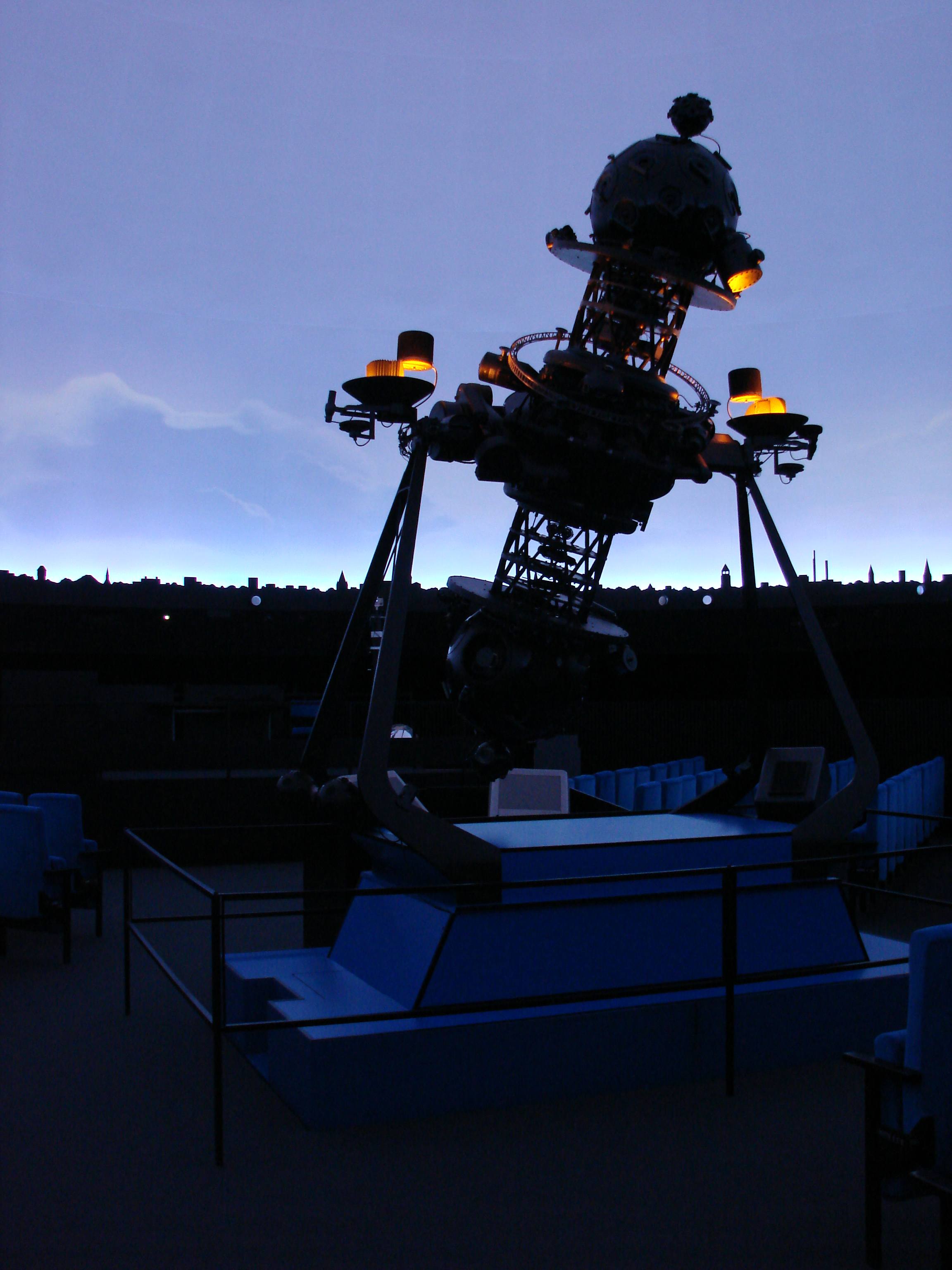 Zeiss-Planetariumsprojektor V im Planetarium Berlin.